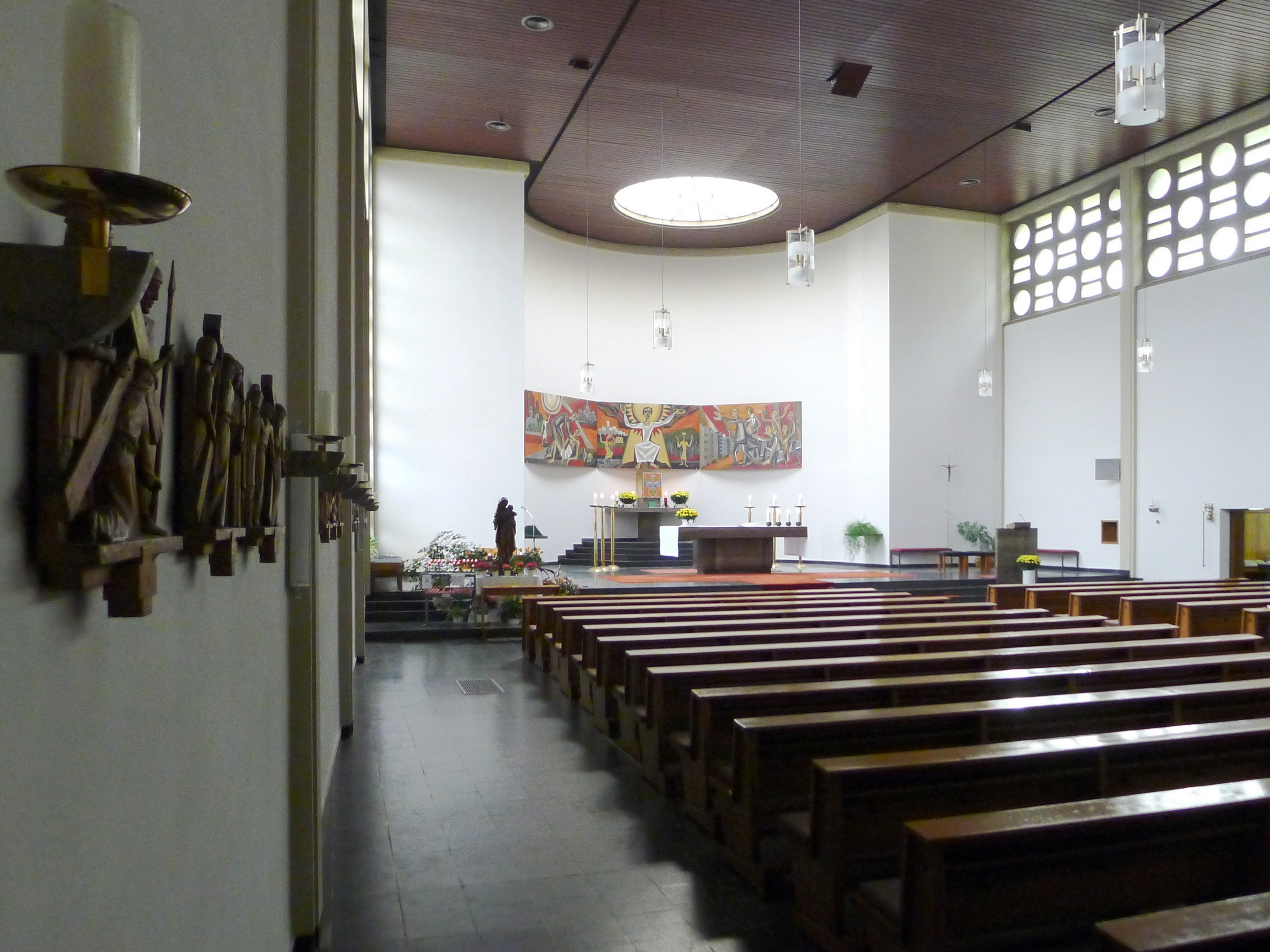 Blick in den Kirchraum